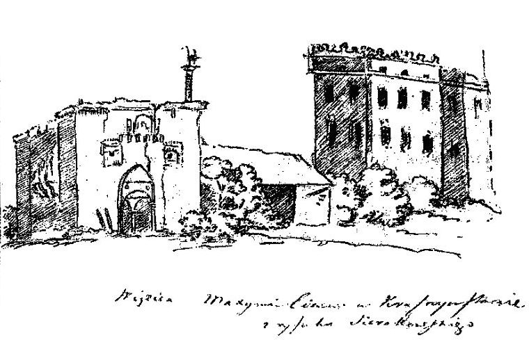 Ruiny zamku w Krasnymstawie. Więzienie Maksymiliana w Krasnymstawie z rysunku Sierakowskiego, rysunek pióro, atram., 15,2x19,6; Rys. Pol. 2947, w: Rysunki z kolekcji J. I. Kraszewskiego w Muzeum Narodowym w Warszawie, WAiF, s. 222, poz. 811, Warszawa 1961.